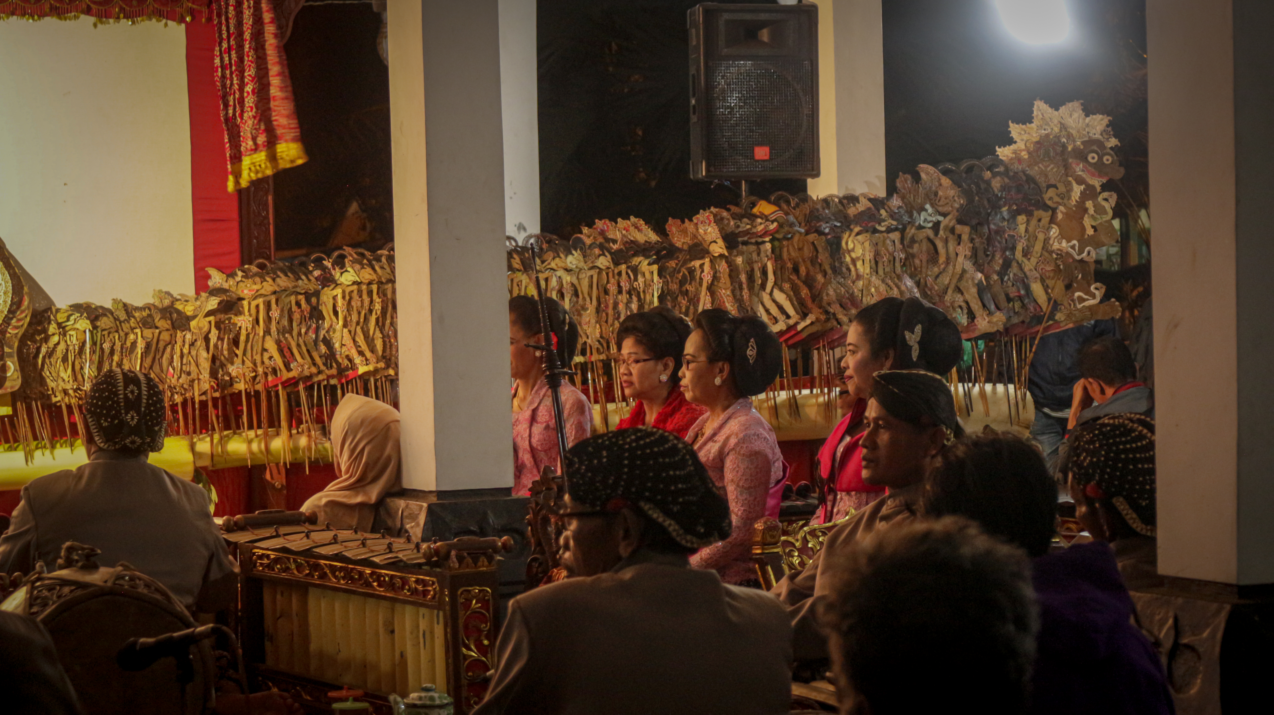 Wayang kulit warisan budaya Indonesia